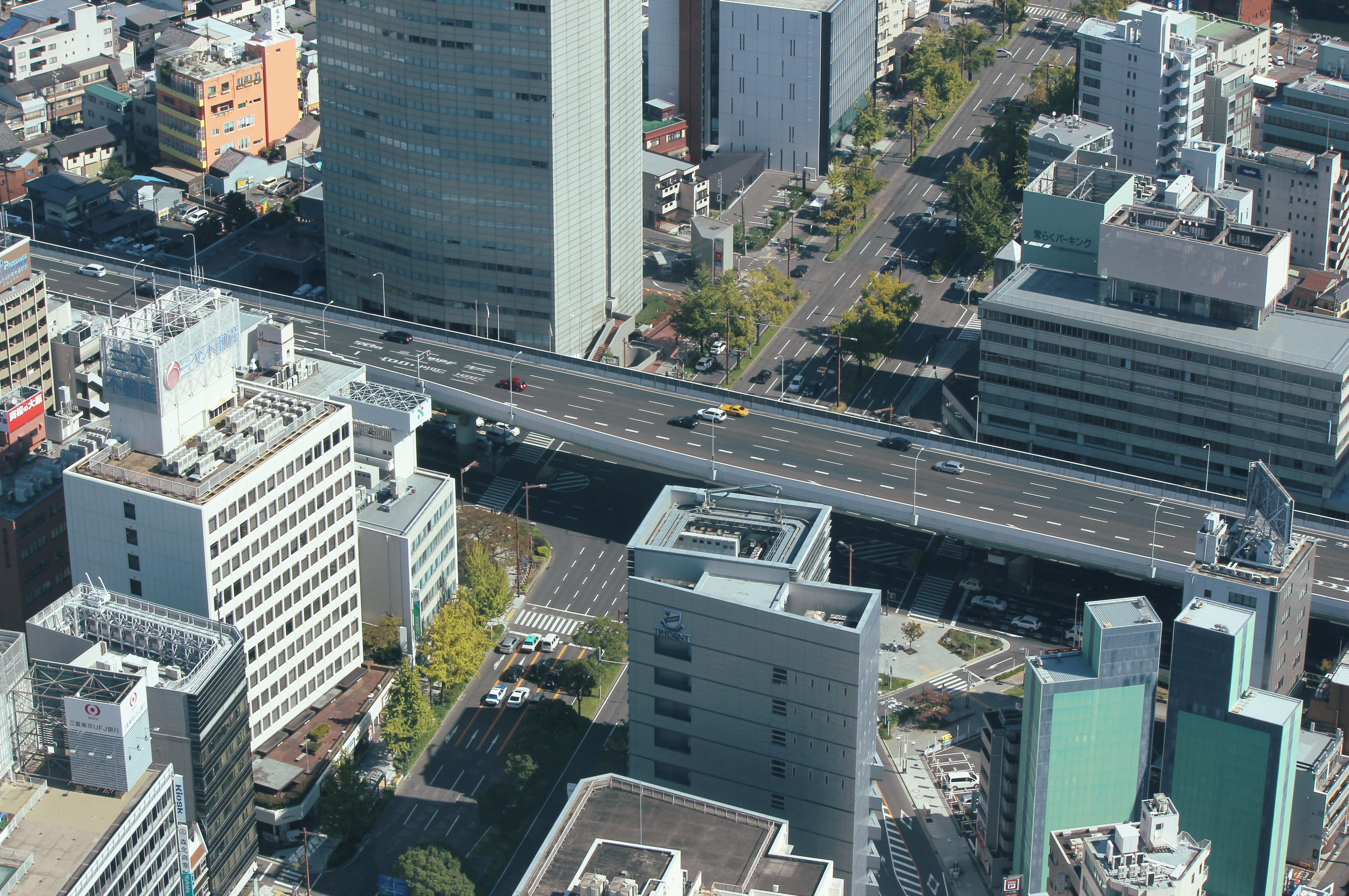 名古屋高速都心環状線 名駅入口付近